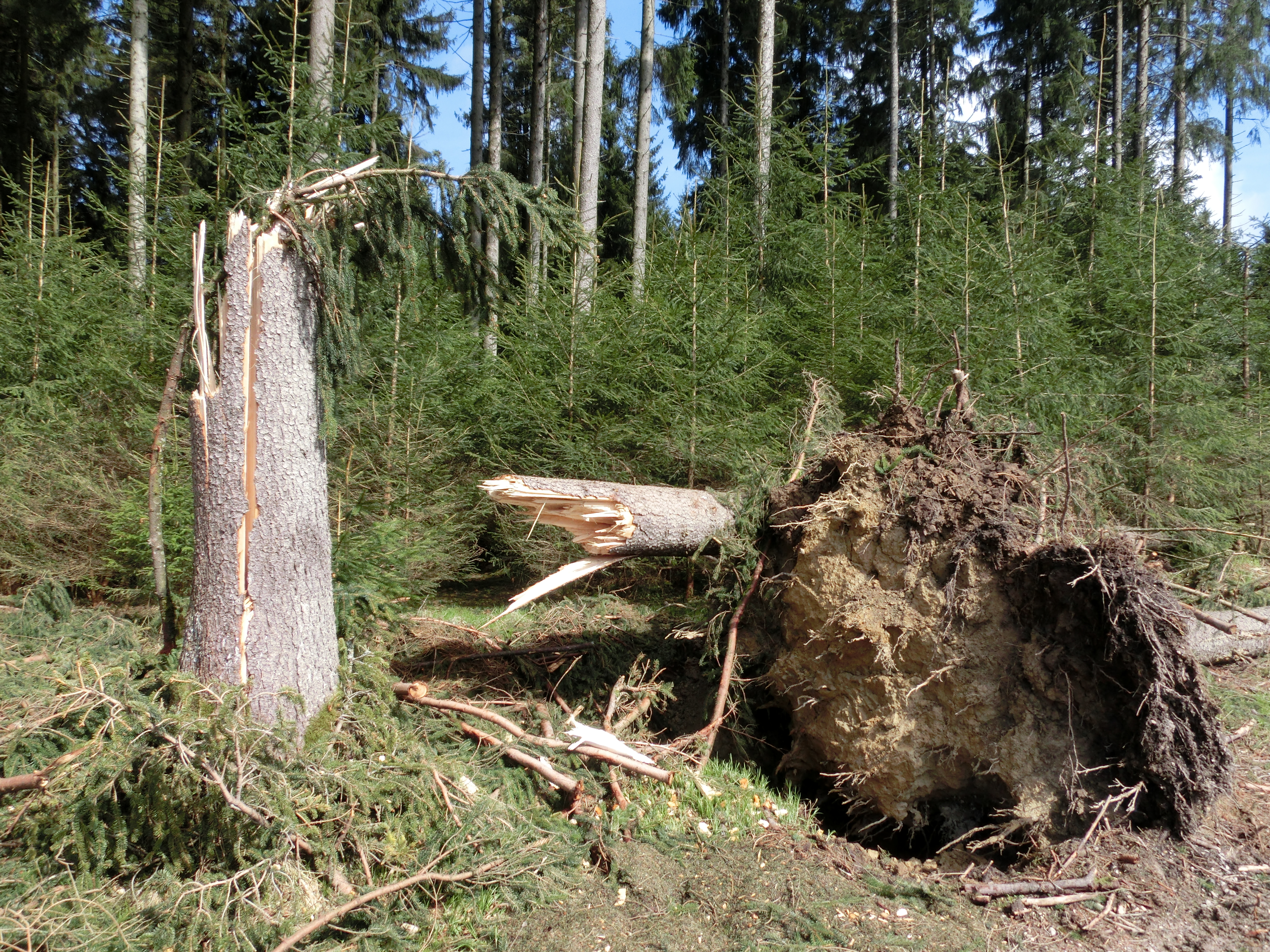 Deutschland (D) - Baden-Württemberg (BW) - Landkreis Sigmaringen (SIG) - Pfullendorf: Sturmschaden nach Orkan Niklas im Spitalwald